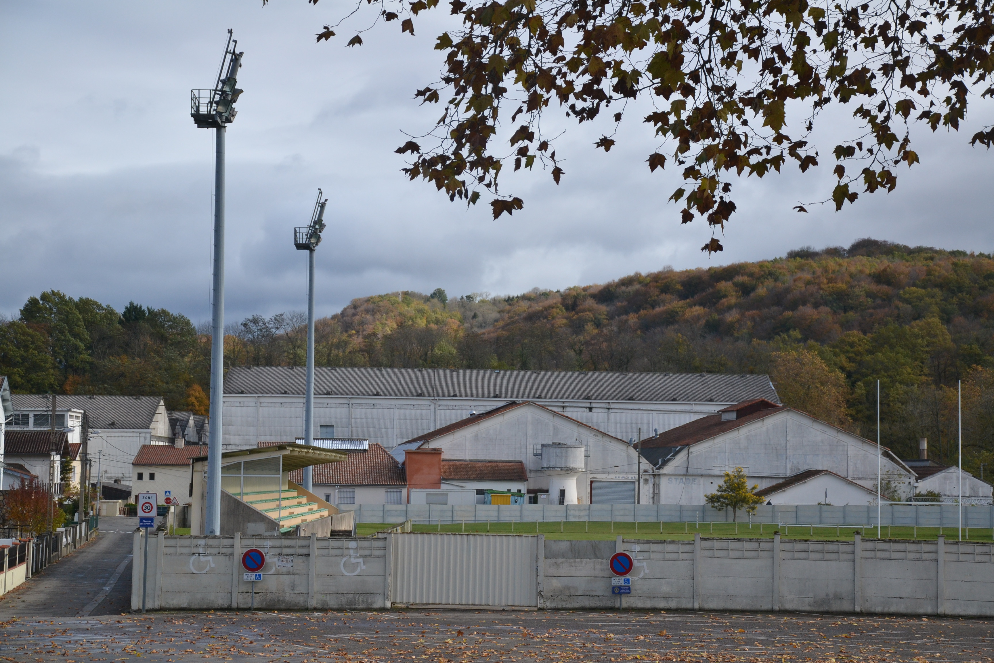 Le stade de Lavelanet. Au fond, l'ancienne usine textile FTL (Ariège, France).